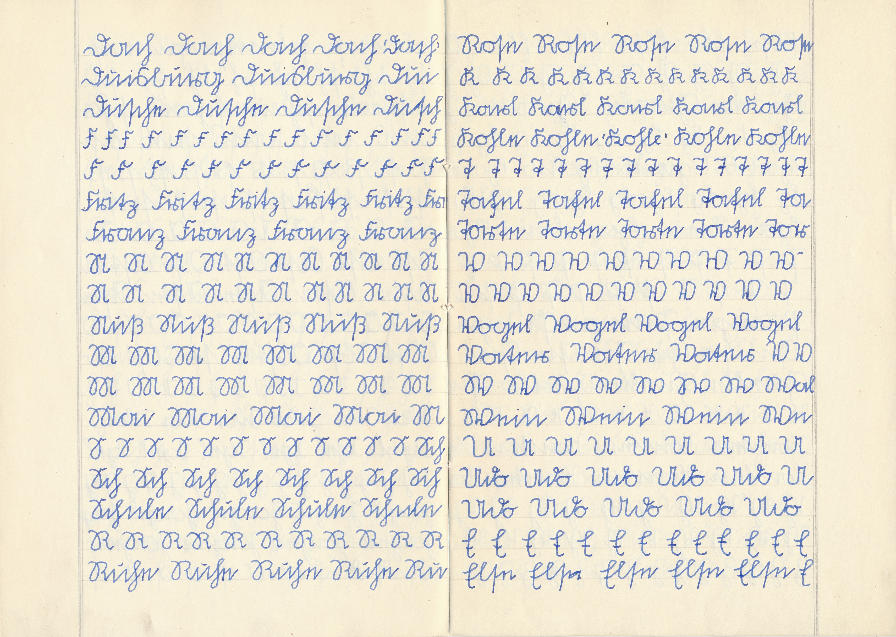 Übungen in deutscher Schrift in einem Schulheft des ersten Schuljahres (1953);Dach, Duisburg, Dusche, F, Fritz, Franz, N, Nuß, M, Mai, S, Sch, Schule, R, Ruhe, Rose, K, Karl, Kohle, T, Tafel, Torte, V, Vogel, Vater, W, Wal, Wein, U, Udo, E, Else